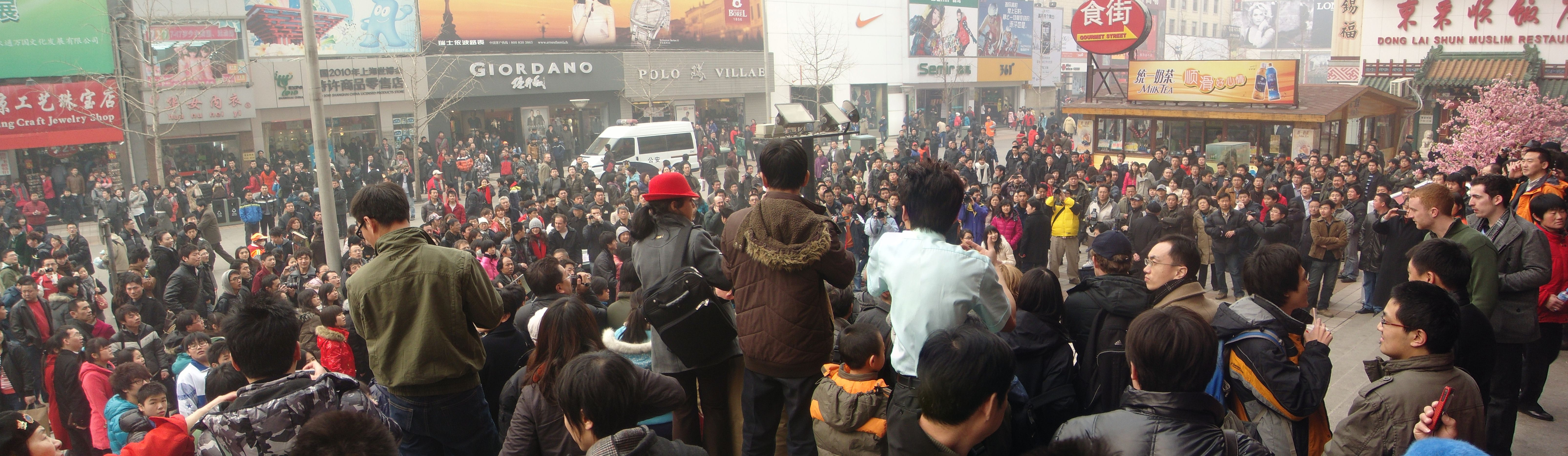 中国茉莉花革命